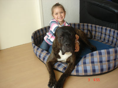 Bild zeigt AVD e.V. Importhund, Dogo Canario.